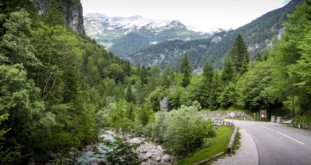 Slowenien, Julische Alpen: Botanischer Garten Alpinum Juliana in Trenta: Blick von Trenta nach Nord: Links der Isonzo und rechts_im Bild: der Zugang zum Botanischen Garten direkt an der Werschetz-Pass-Straße.